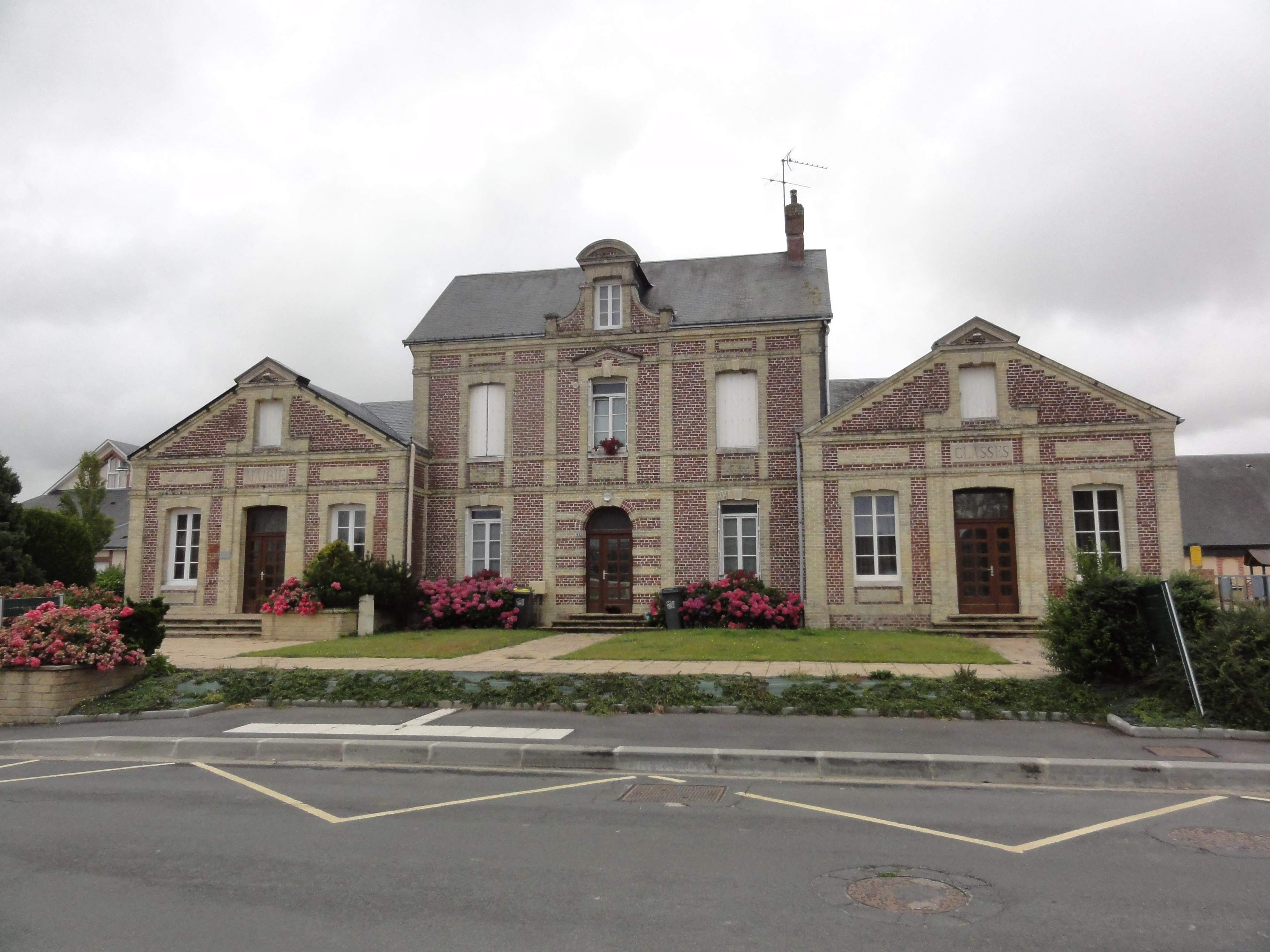 Bretteville-du-Grand-Caux (Seine-Mar.) école et ancienne mairie